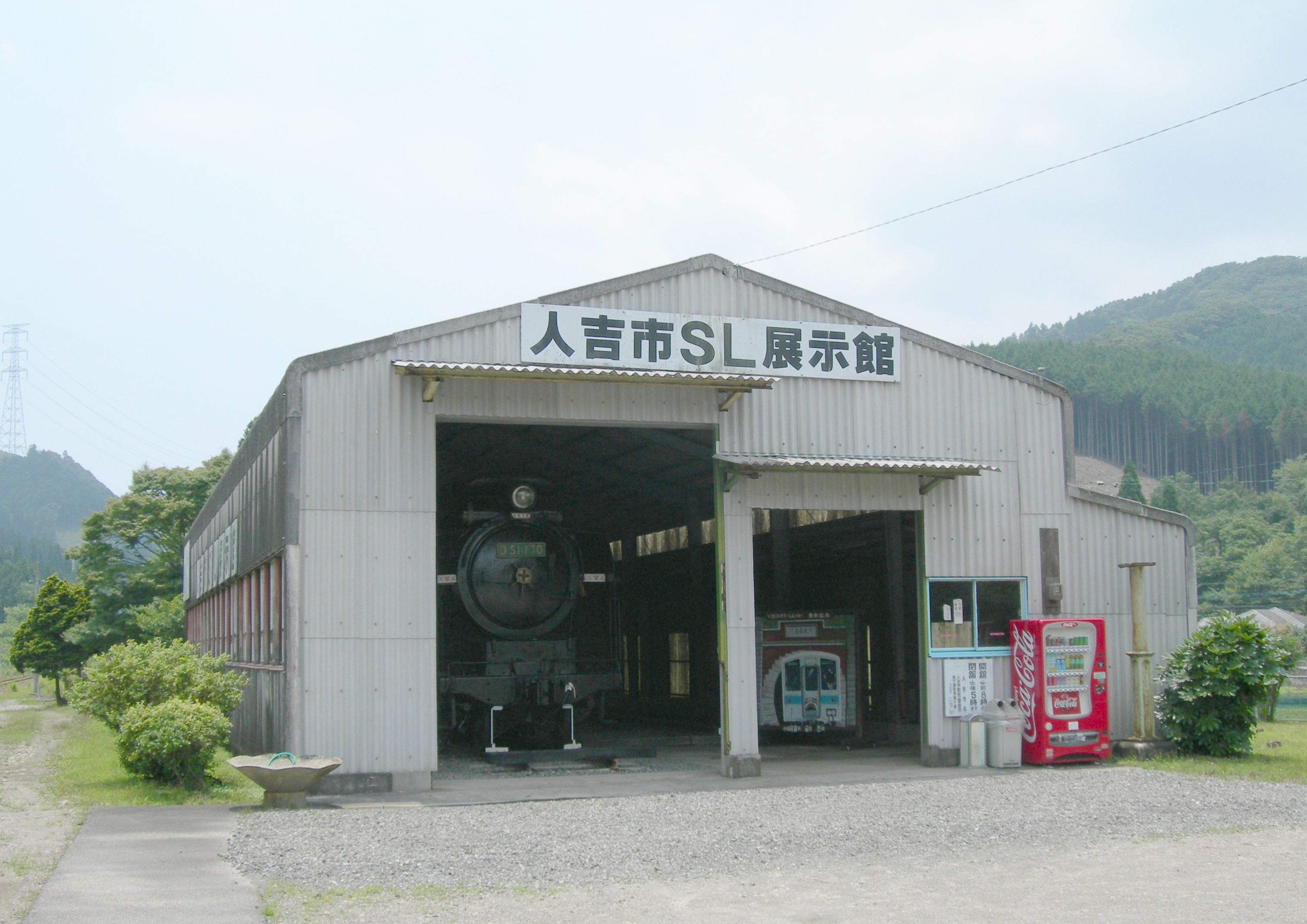 JR九州肥薩線矢岳駅構内のSL展示館